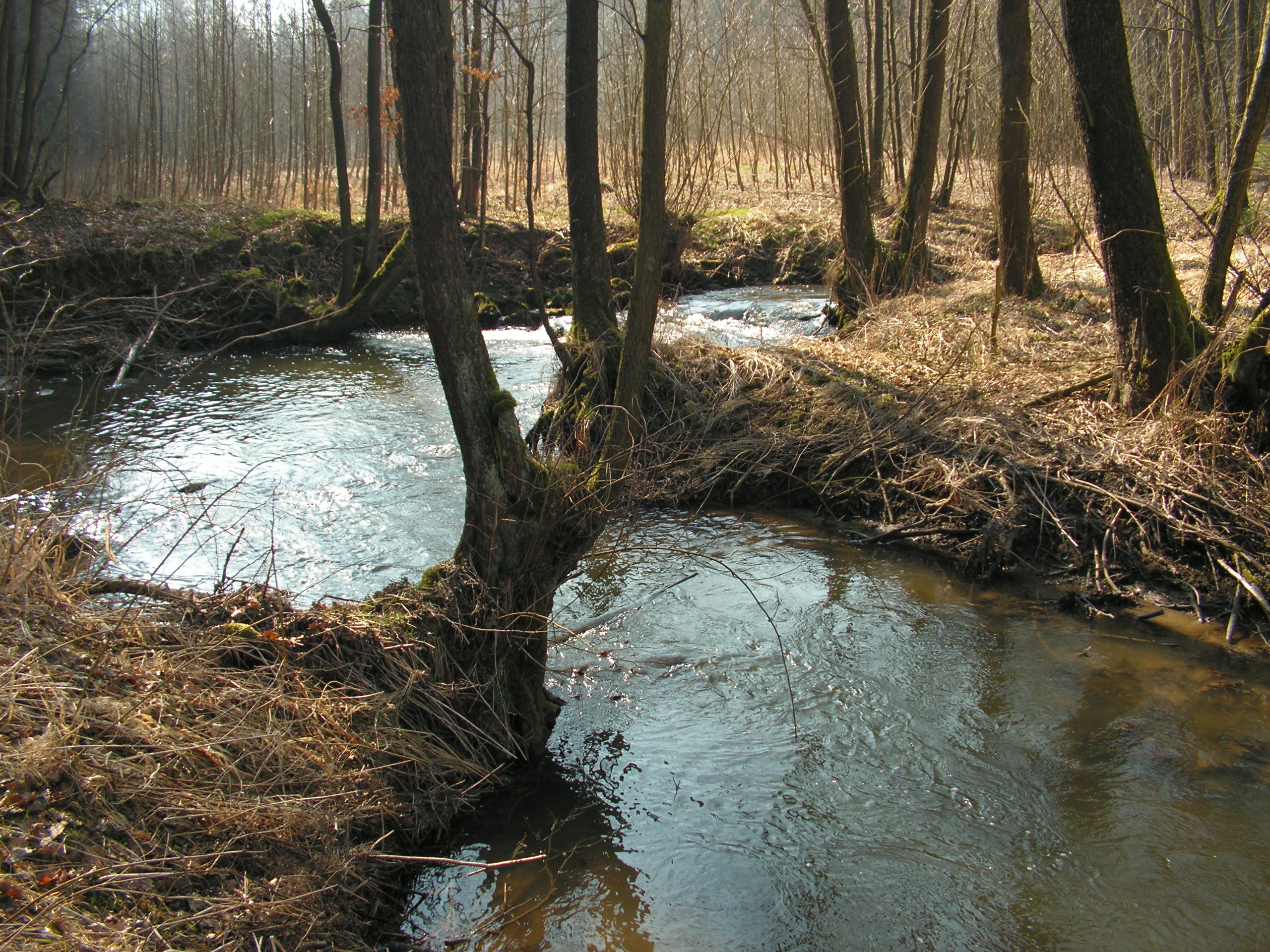 Pohled z lávky na Perlový potok na zhruba 0,7 říčním kilometru